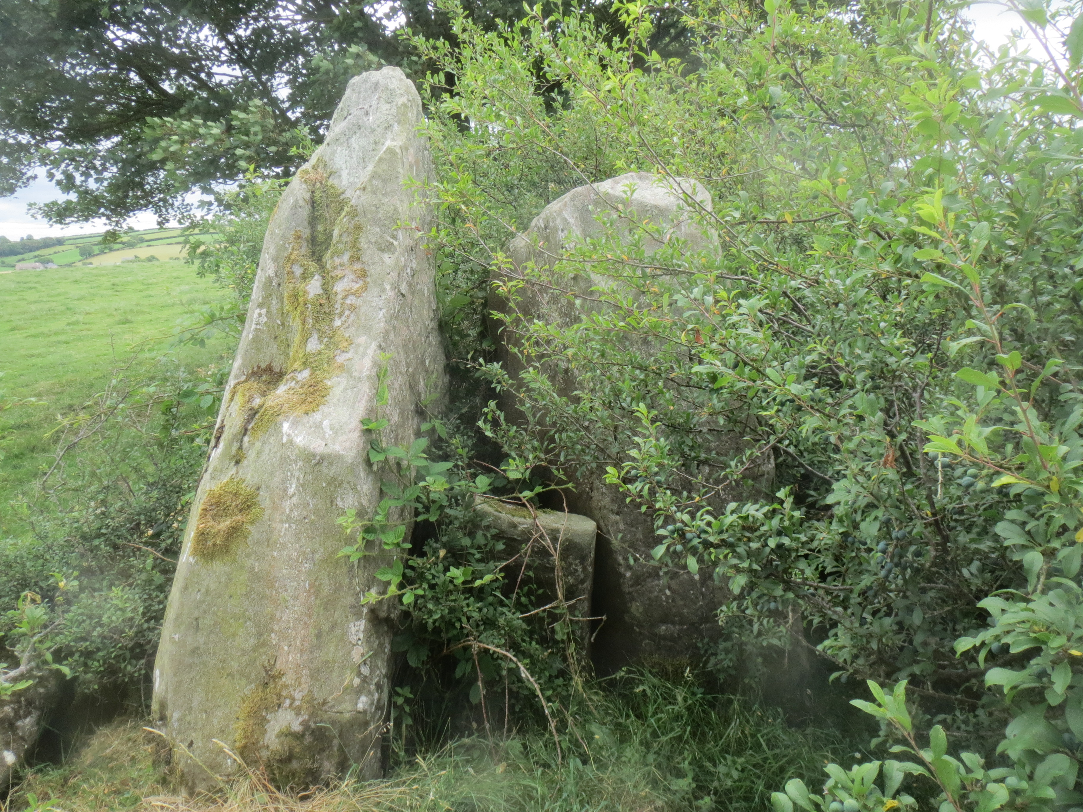 Carncorran Glebe Dolmen